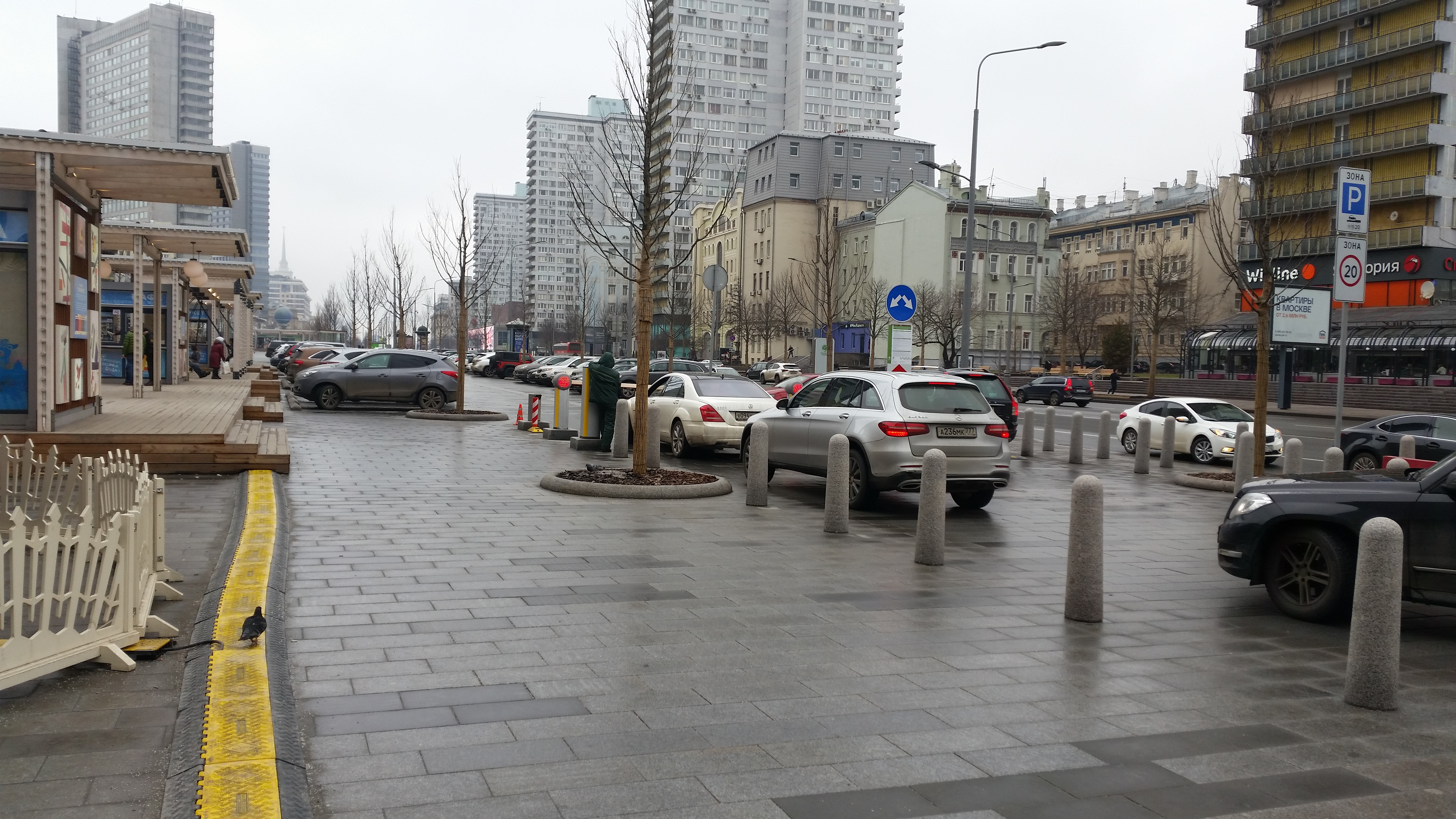 Плоскостная городская парковка на Новом Арбате в Москве (апрель 2017)